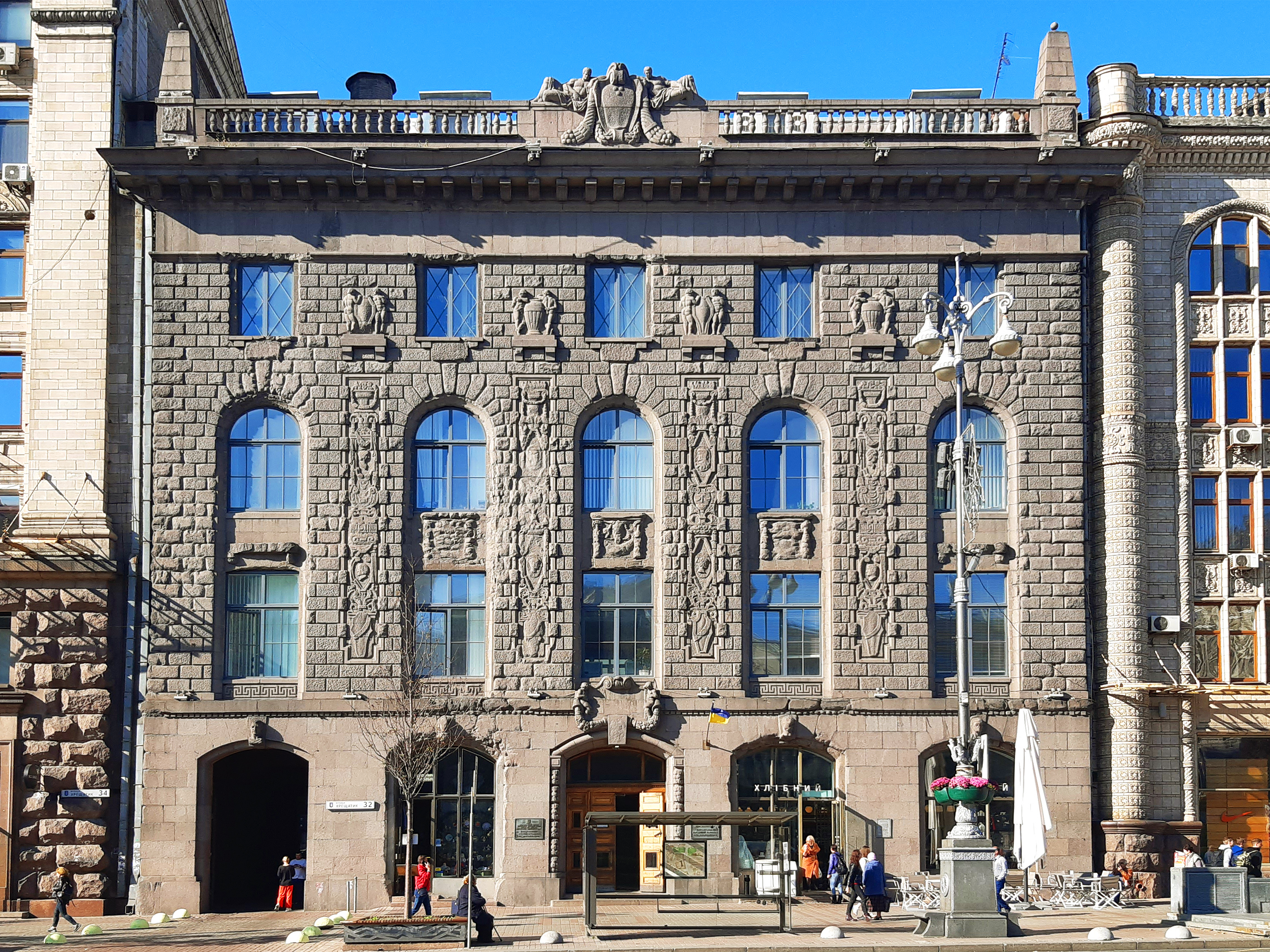 Банківська будівля, Київ, вул. Хрещатик, 32